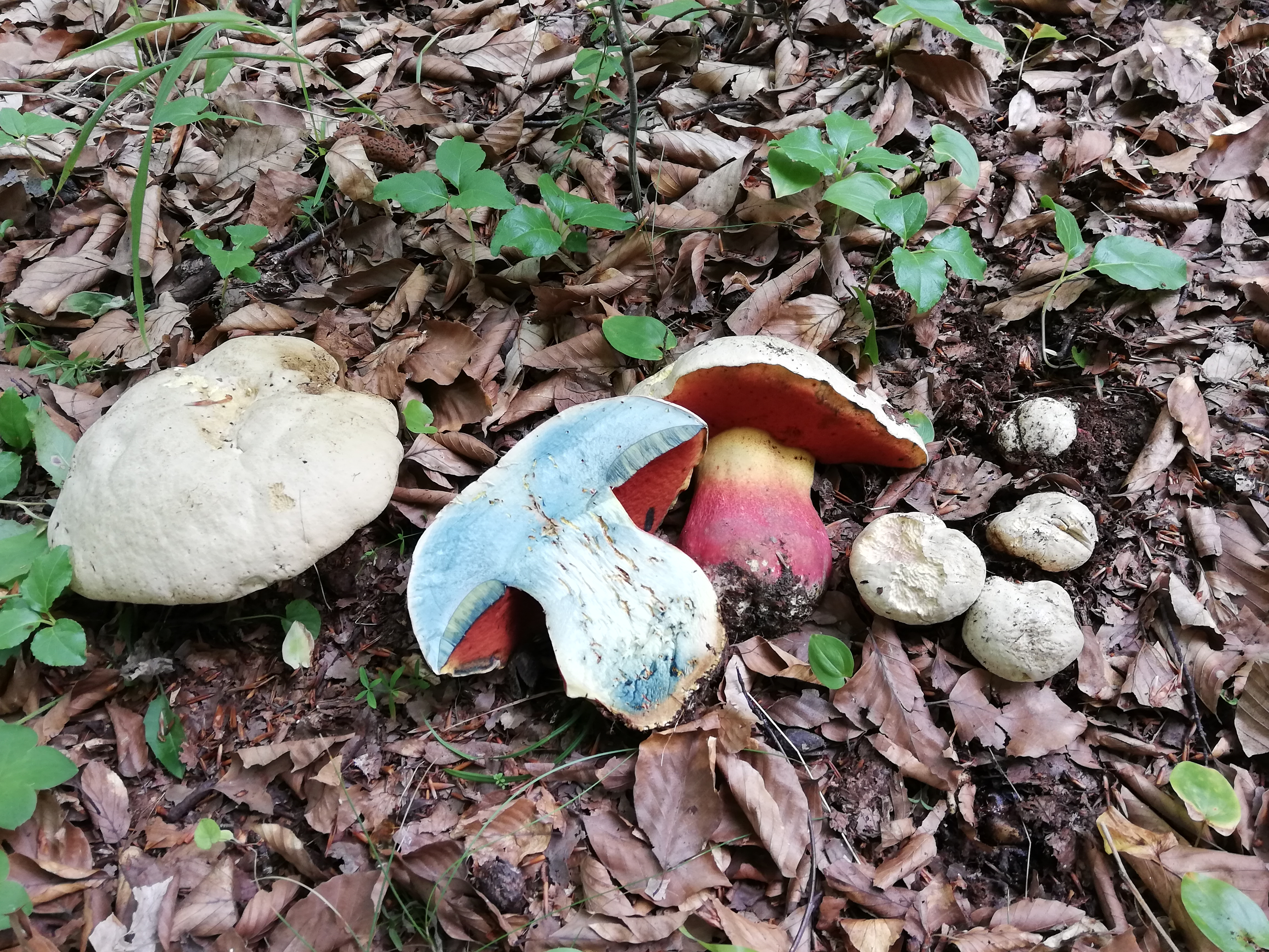 Borowik szatański pokrój, kolor kapelusza, wygląd trzonu i hymenoforu oraz przekrój.